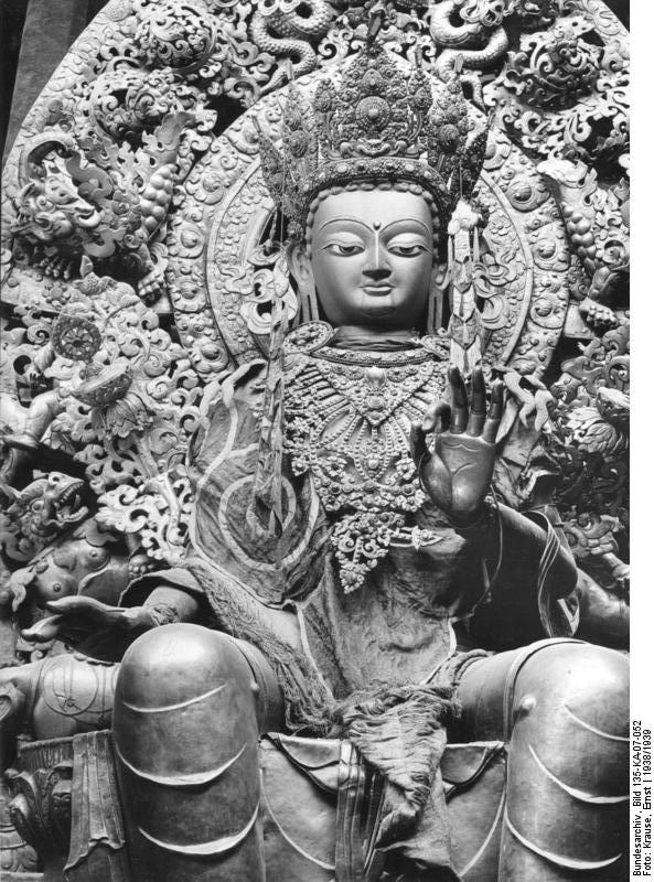 Tibetexpedition, Statue im Stadttempel in Lhasa Lhasa, Götterfigur (Stadttempel) [Tschamba (Maitrea) im Vorhof des Tsuglhakangs in Lhasa, Maitreya, Byams-pa, Jamba]